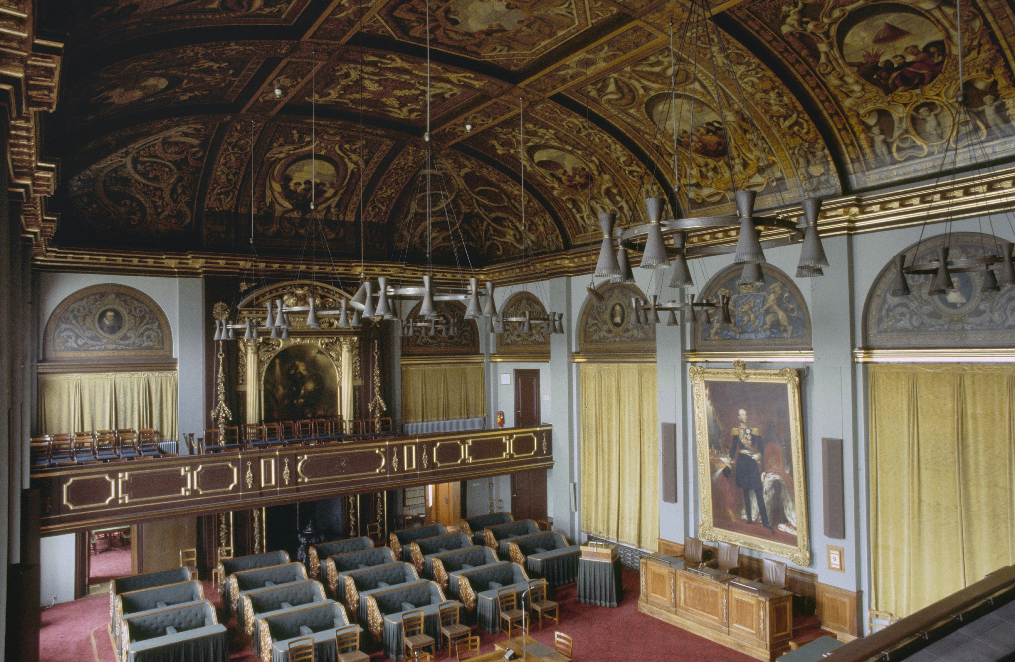 Gebouw Eerste Kamer: Interieur, vergaderzaal van de Eerste kamer met gewelfde zoldering